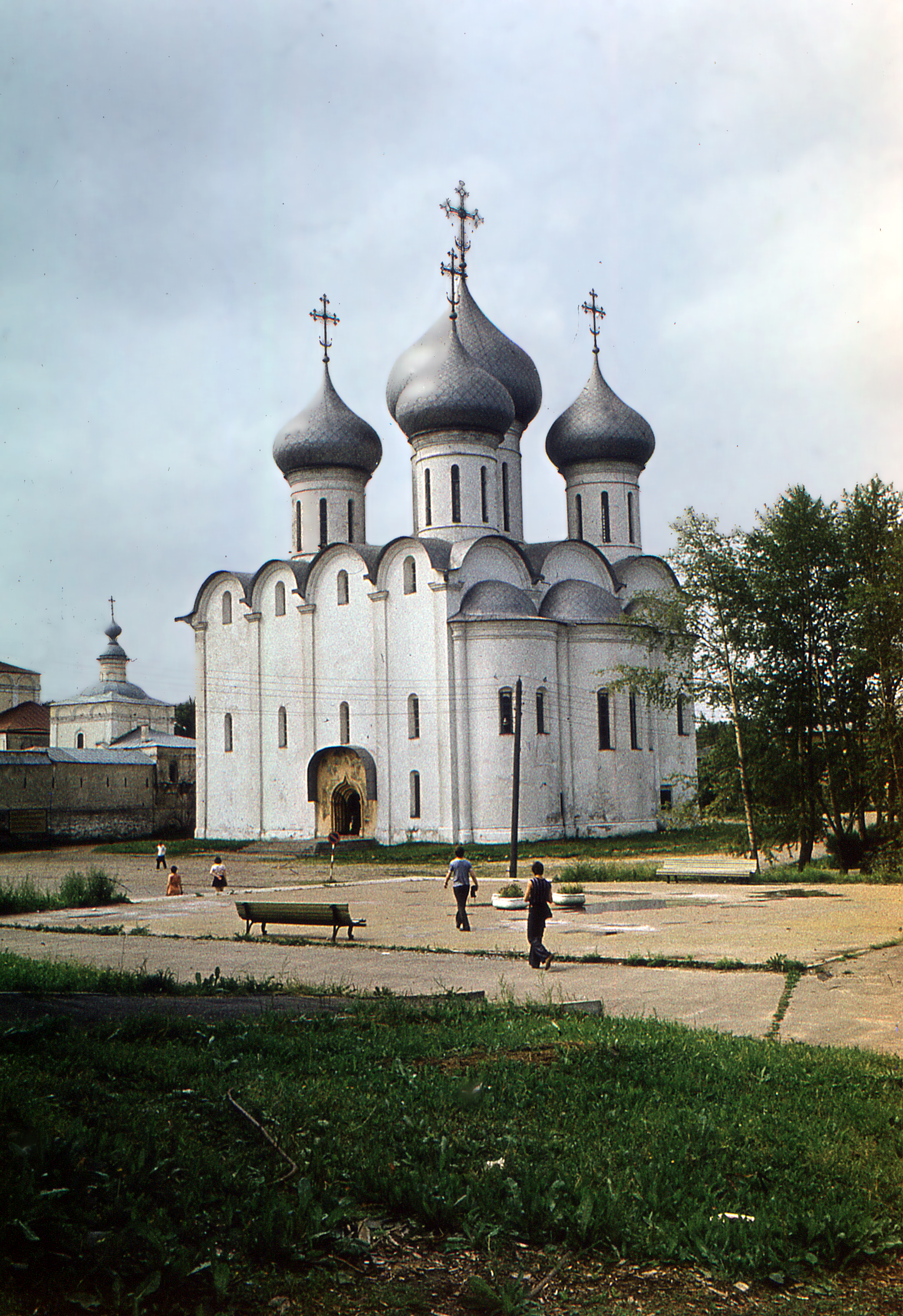 София Вологодская